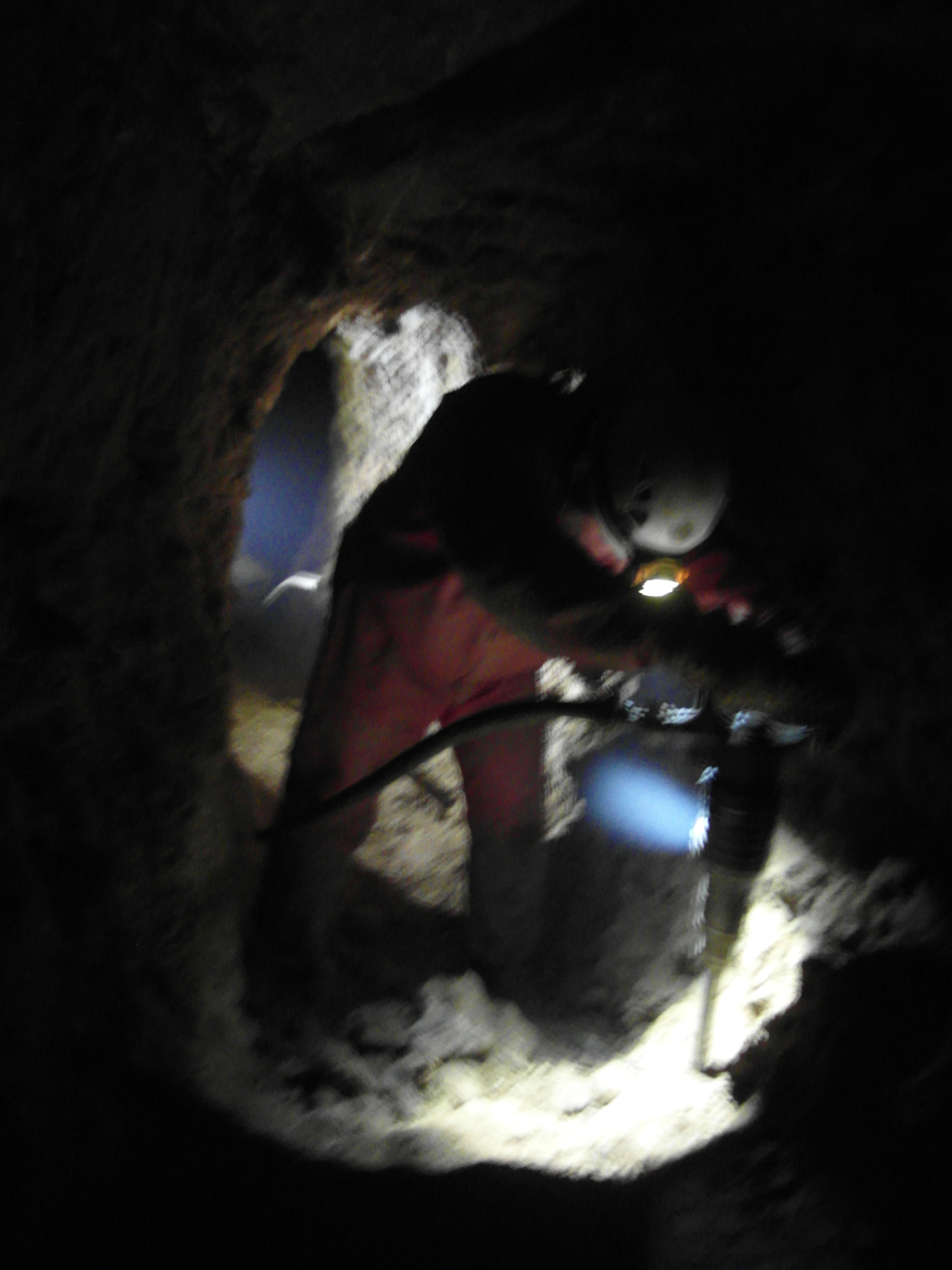 Téměř celá délka chodeb v jeskyni je vykopaná v sedimentech.